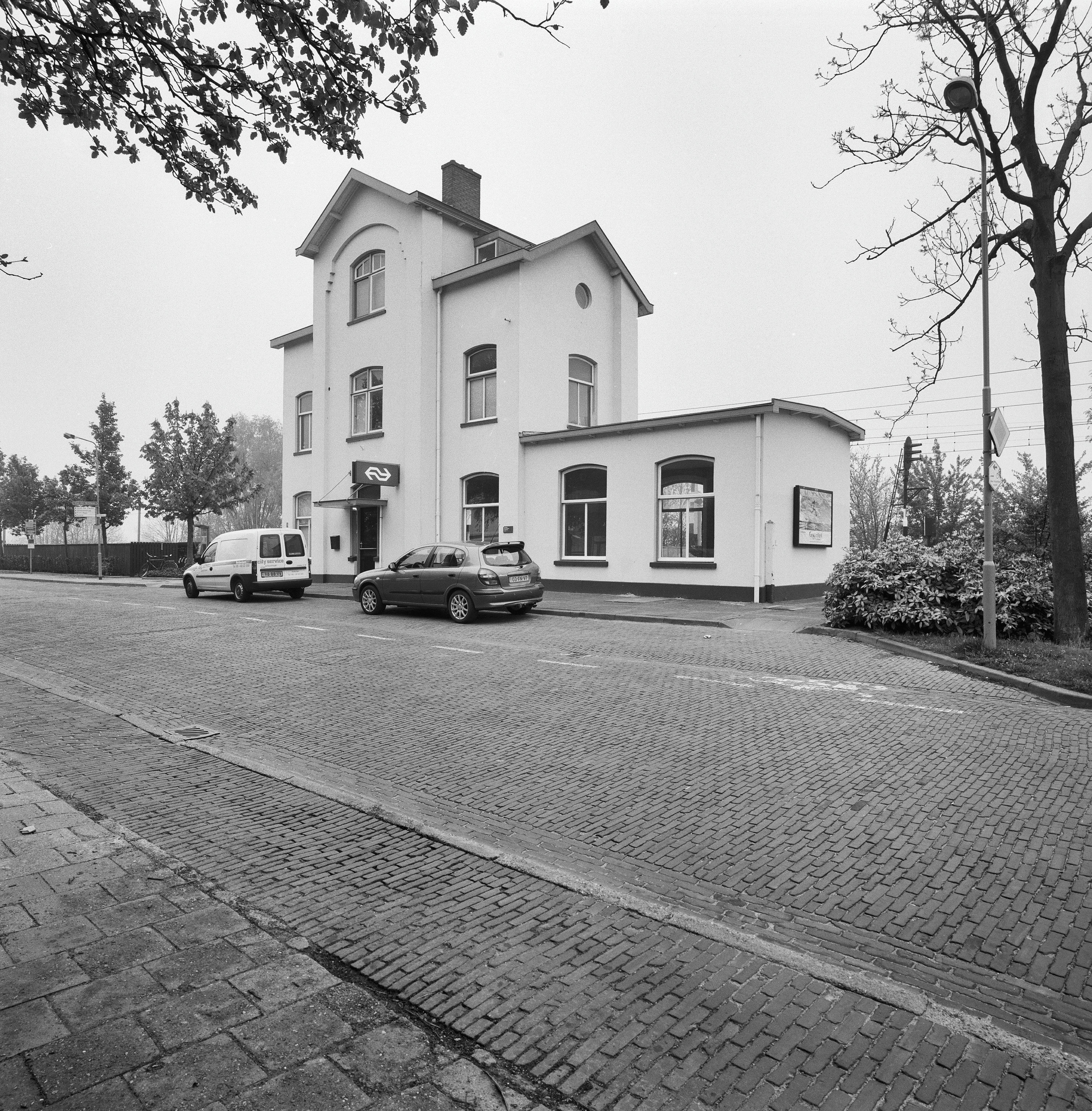 Station Kapelle-Biezelinge: Overzicht voorgevel en rechter zijgevel (opmerking: Gefotografeerd voor Monumenten In Nederland Zeeland, bladzijde 142)